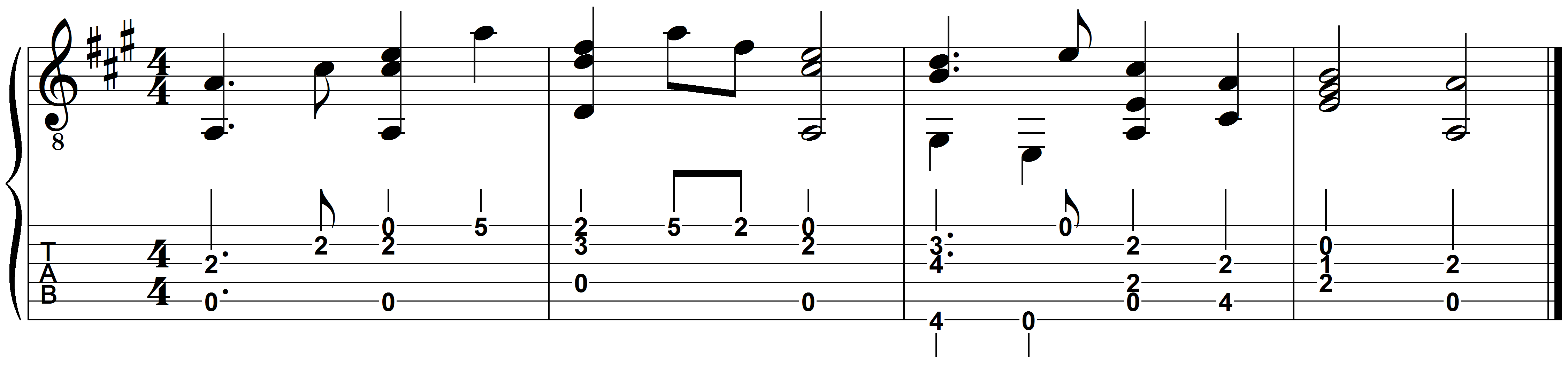 „Alle Vöglein sind schon da“: oben in herkömmlicher Notenschrift und in Gitarrentabulatur